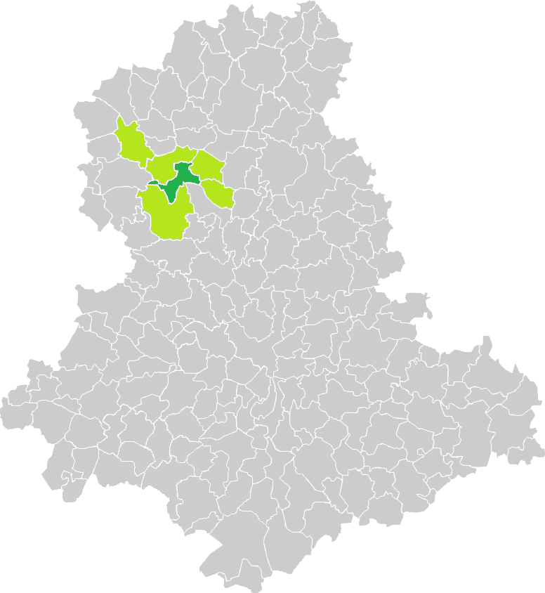 Carte de situation de la commune de Bellac (en vert foncé) dans le votre Canton (en vert clair) sur une carte des communes de la Haute-Vienne